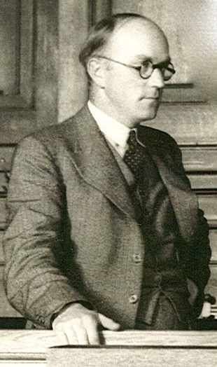 'Finn Moe' (Q5450653)